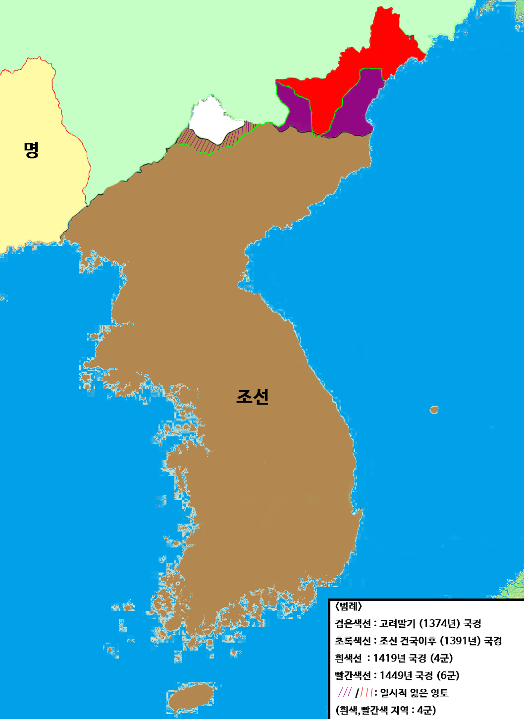 조선의 북벌